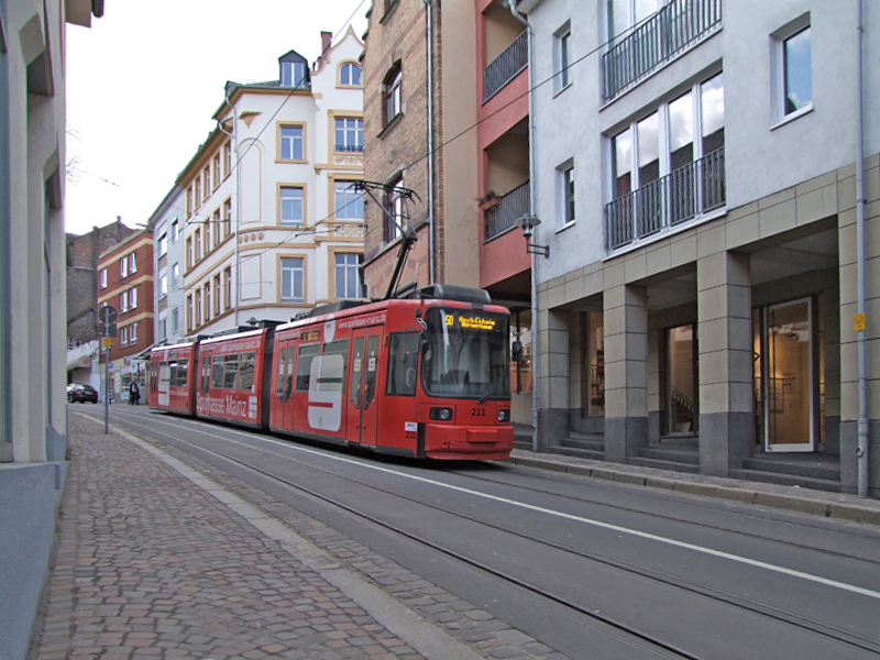 Mainzer Straßenbahn: Die Steigung in der Mainzer Gaustraße mit 9,549 % ist die steilste Streckenführung einer Straßenbahn ohne Steighilfe (beispielsweise Zahnradbahn oder Seilbahn) in Deutschland.